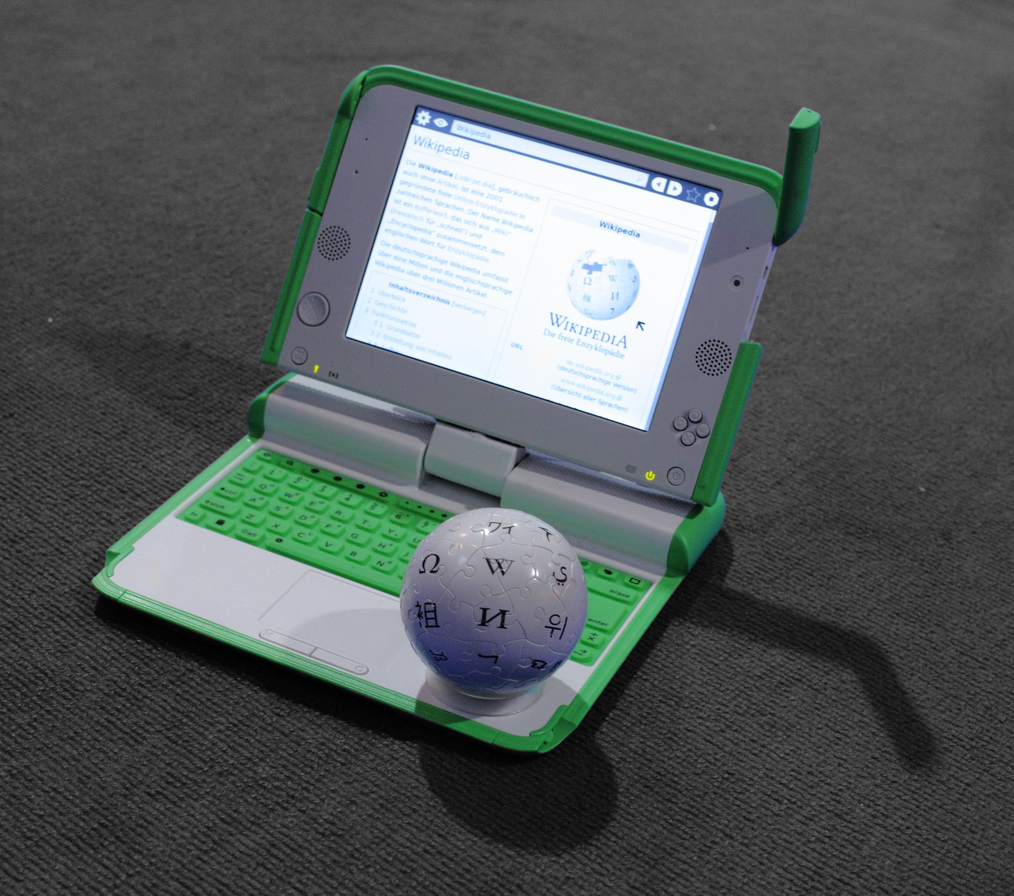 A Wikipedia ball on an OLPC XO at LinuxTag 2012 Berlin, Germany